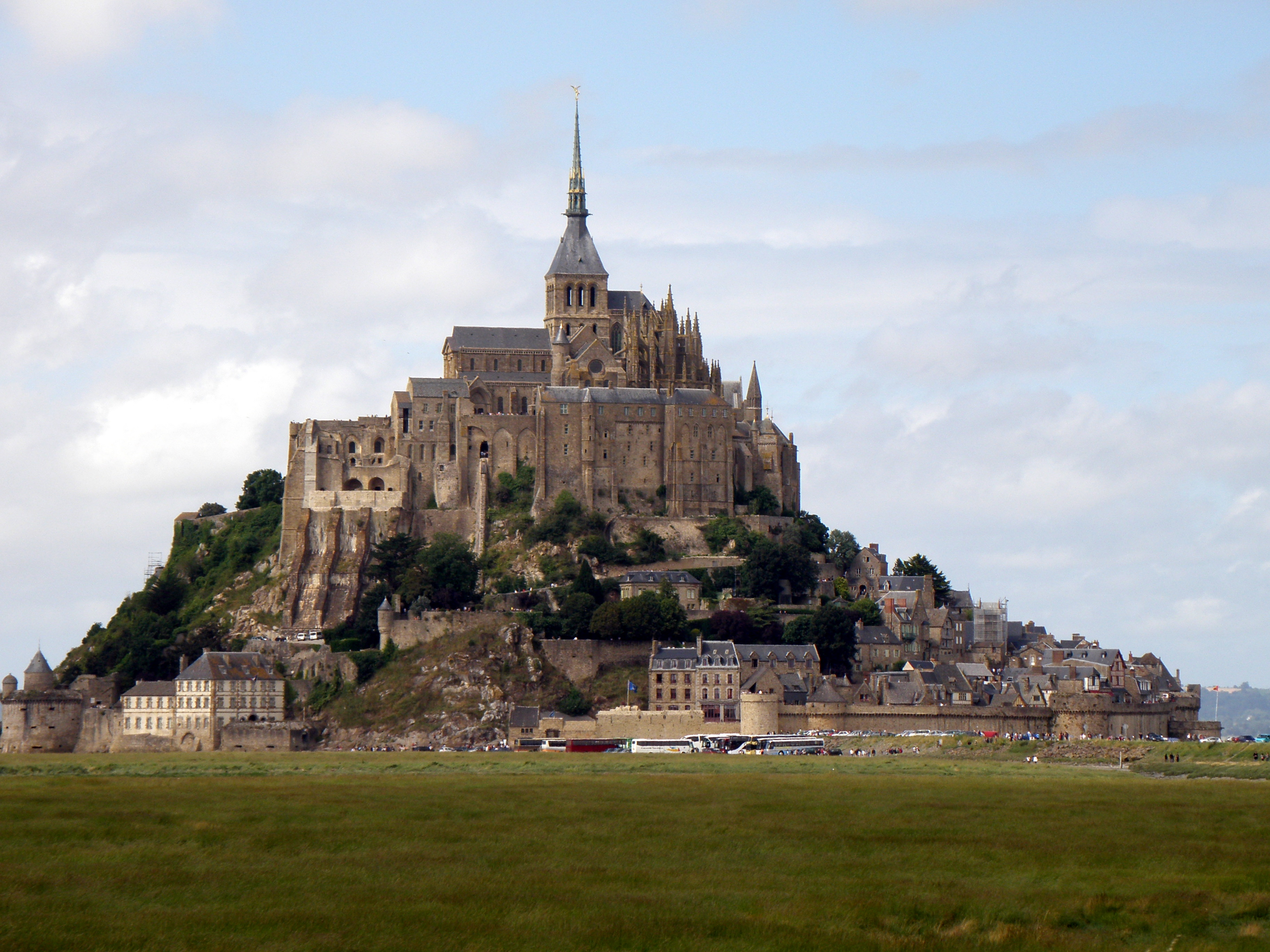 Mont Saint-Michel, Franța